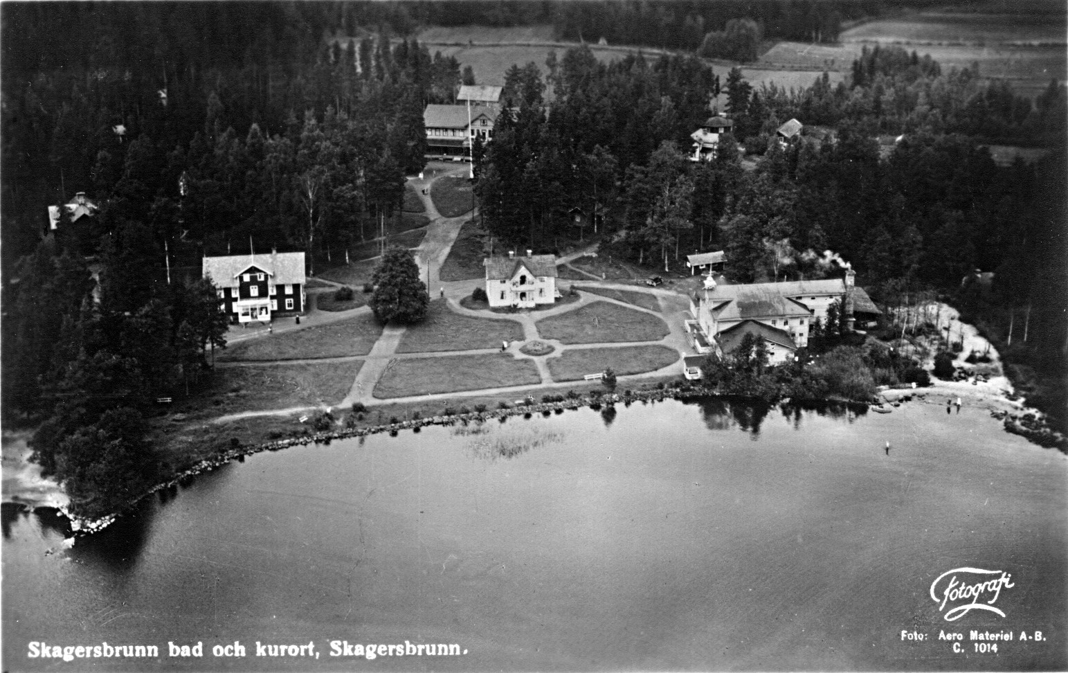 Skagersbrunn i Värmland, 1929.